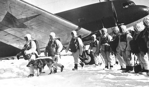 Советские десантники на фоне самолета